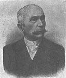 Jan Steinbrener (1835-1909), zakladatel tiskárny Vimperk, knihkupec a vydavatel